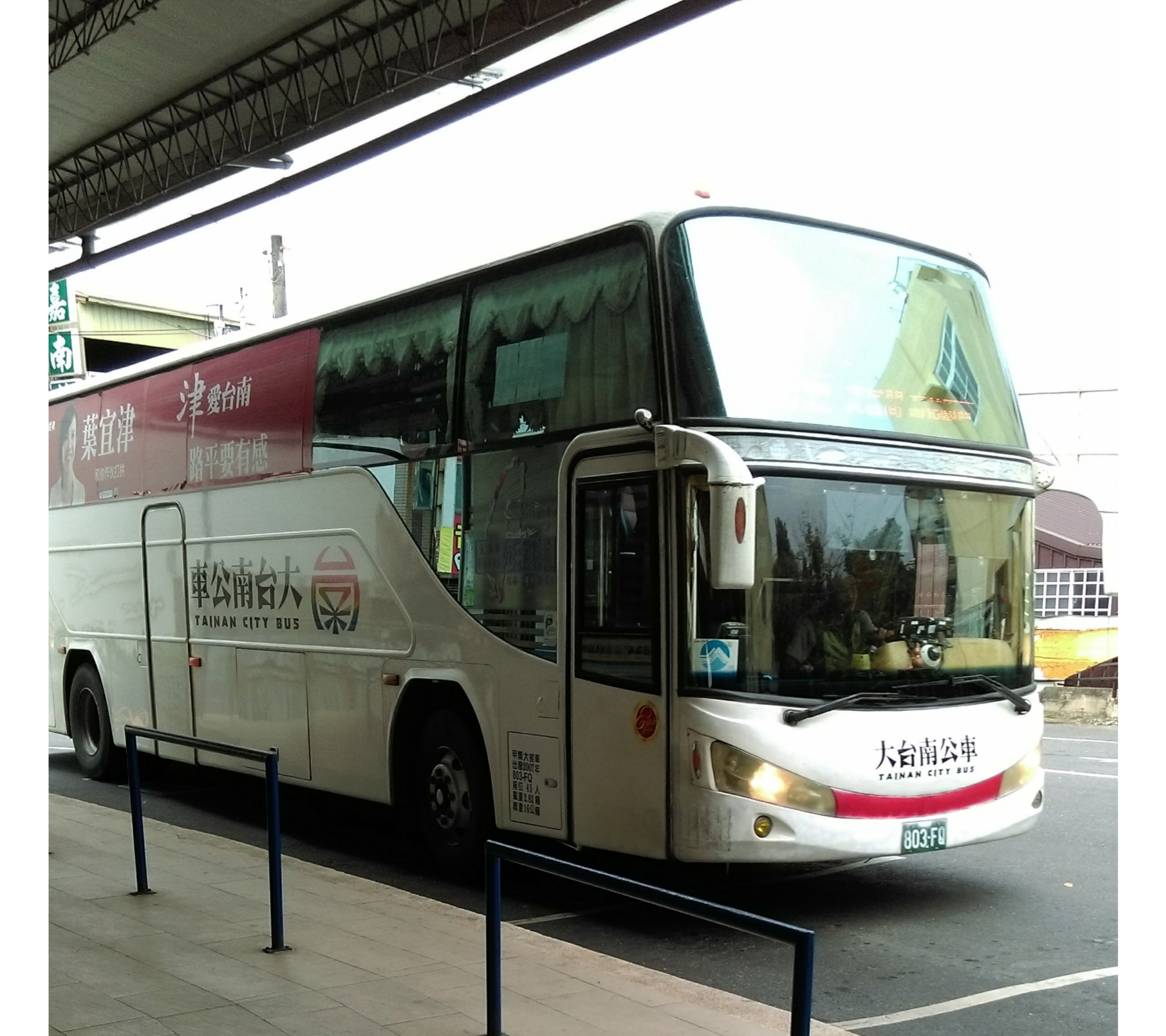 中文（台灣）: 新營客運803-FQ行駛黃幹線(區間車)